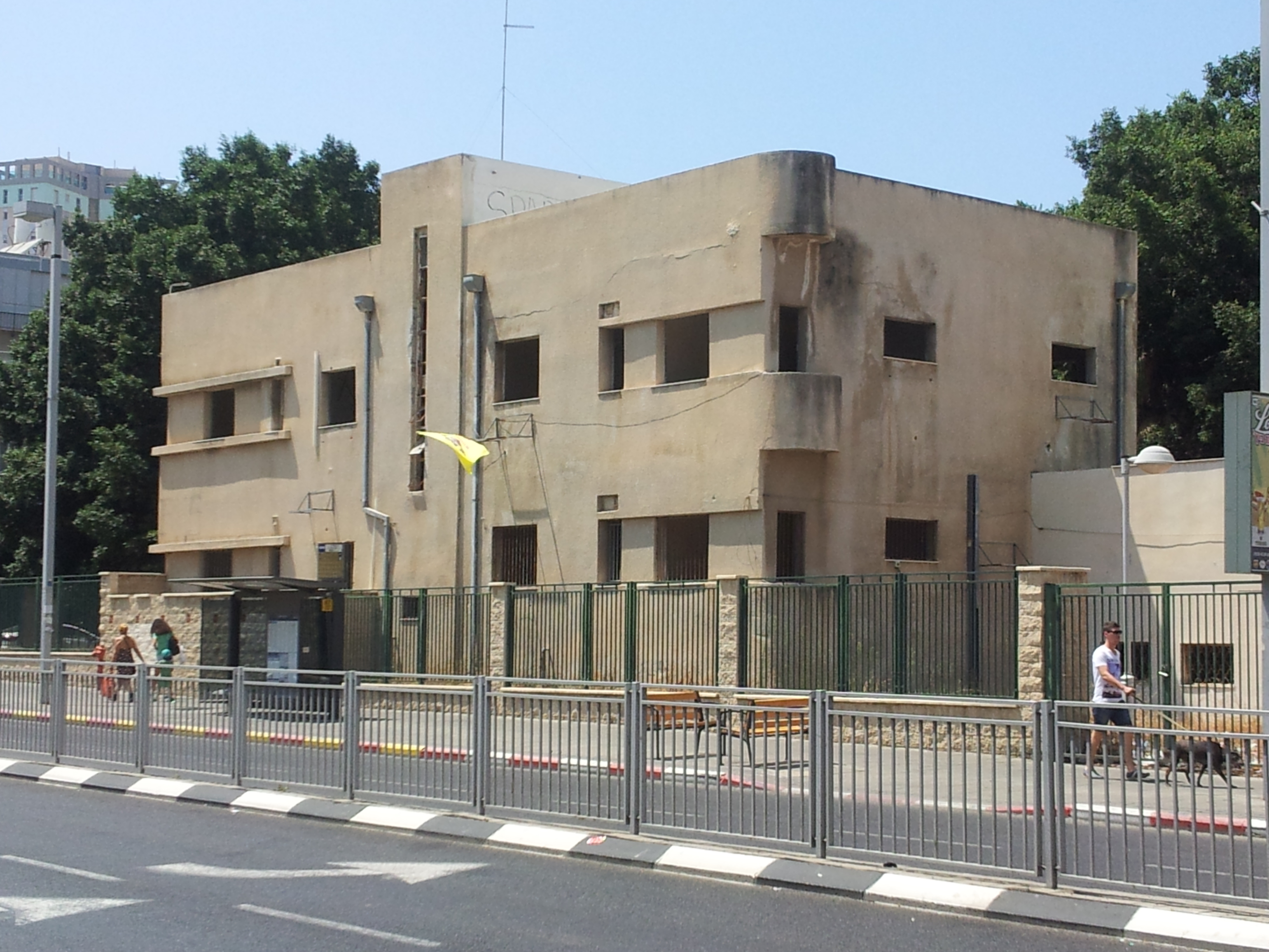 מבט מדרום מחנה ראובן, בת ים.